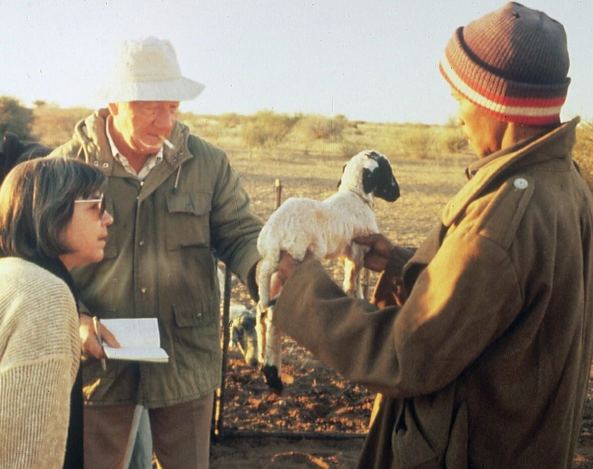 Ovis aries Linné, white Karakul lamb (Persian lamb) in Namibia, Karkulzucht in Namibia - Begutachtung der Fellzeichnung Nr. 44, Region Uhlenhorst. Abgebildet ist der Züchter Dr. Waldemar Lüsse, die Frau des Autors und ein Farmarbeiter im Profil.